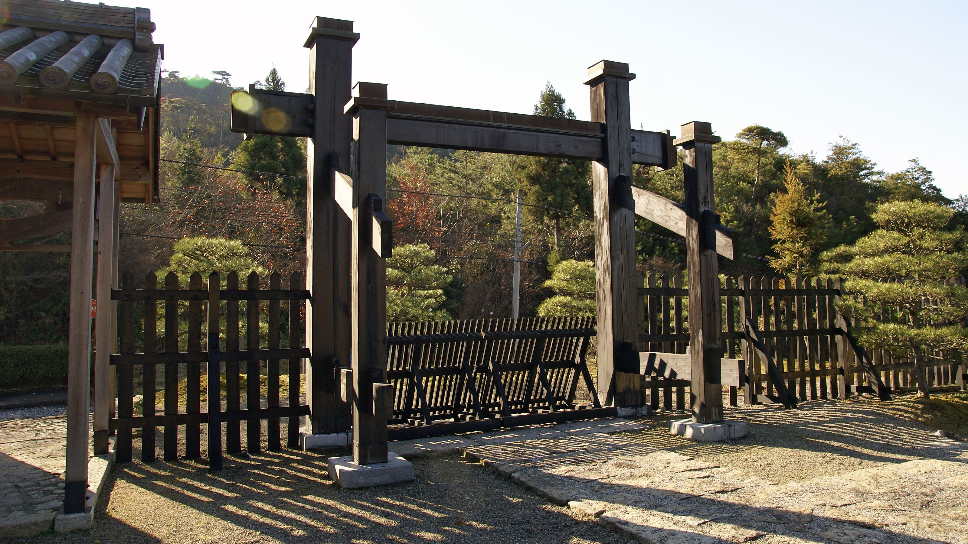 Ishibe-shukuba-no-sato in Konan, Shiga, Japan